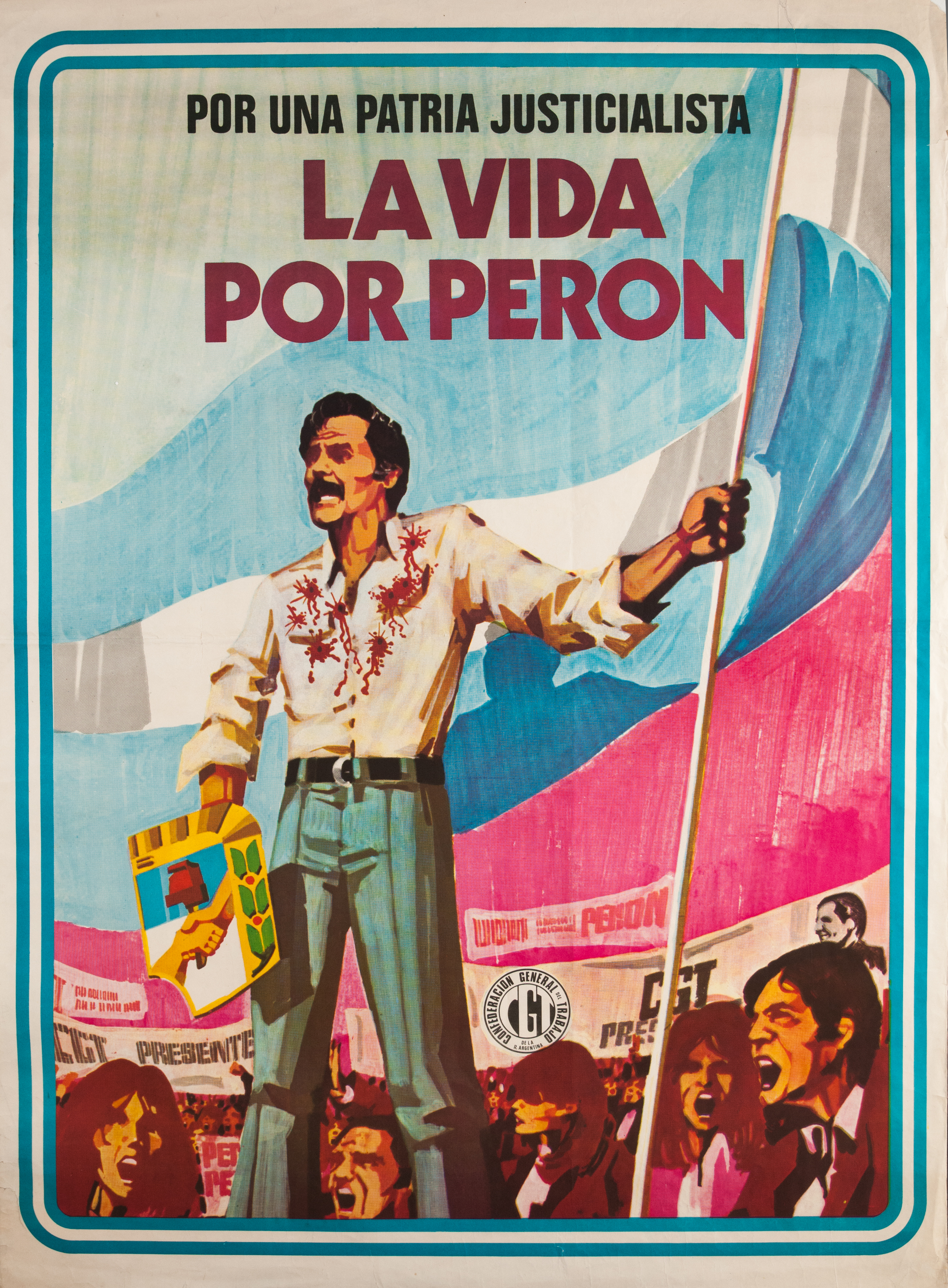 Afiche de la CGT en homenaje al líder sindical José Ignacio Rucci.